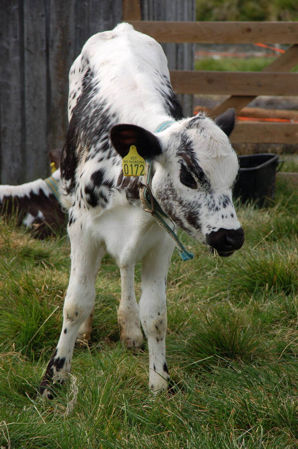 Calf (STN Sidet Trønder- og Nordlandsfe), Rausjødalen Setermeieri, Tolga, Hedmark, Norway, Summer 2006